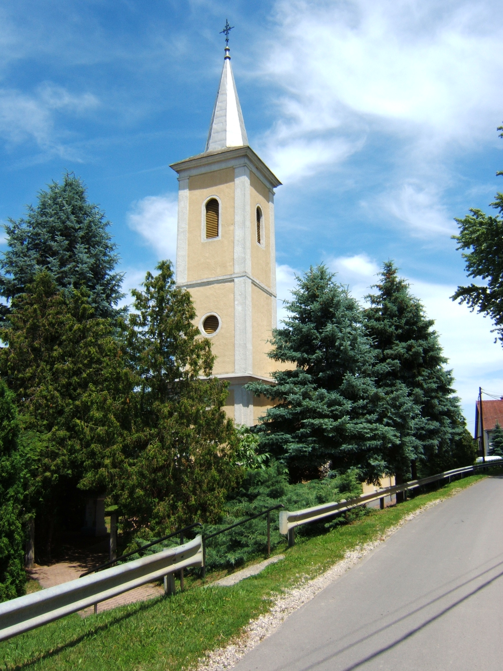 Zselickislak, Szent István király-templom, 1790-ben épült, későbarokk stílusban. Építtetője Esterházy herceg.